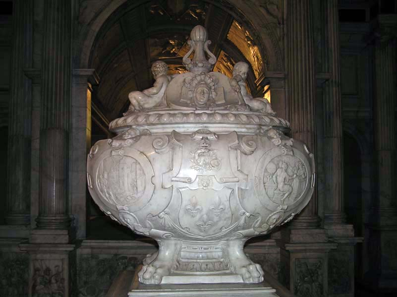 Tombeau du Coeur de François I, roi de France